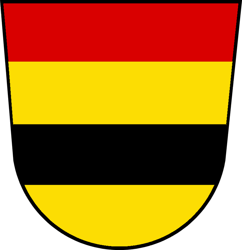 Wappen des Reichsstifts Wettenhausen